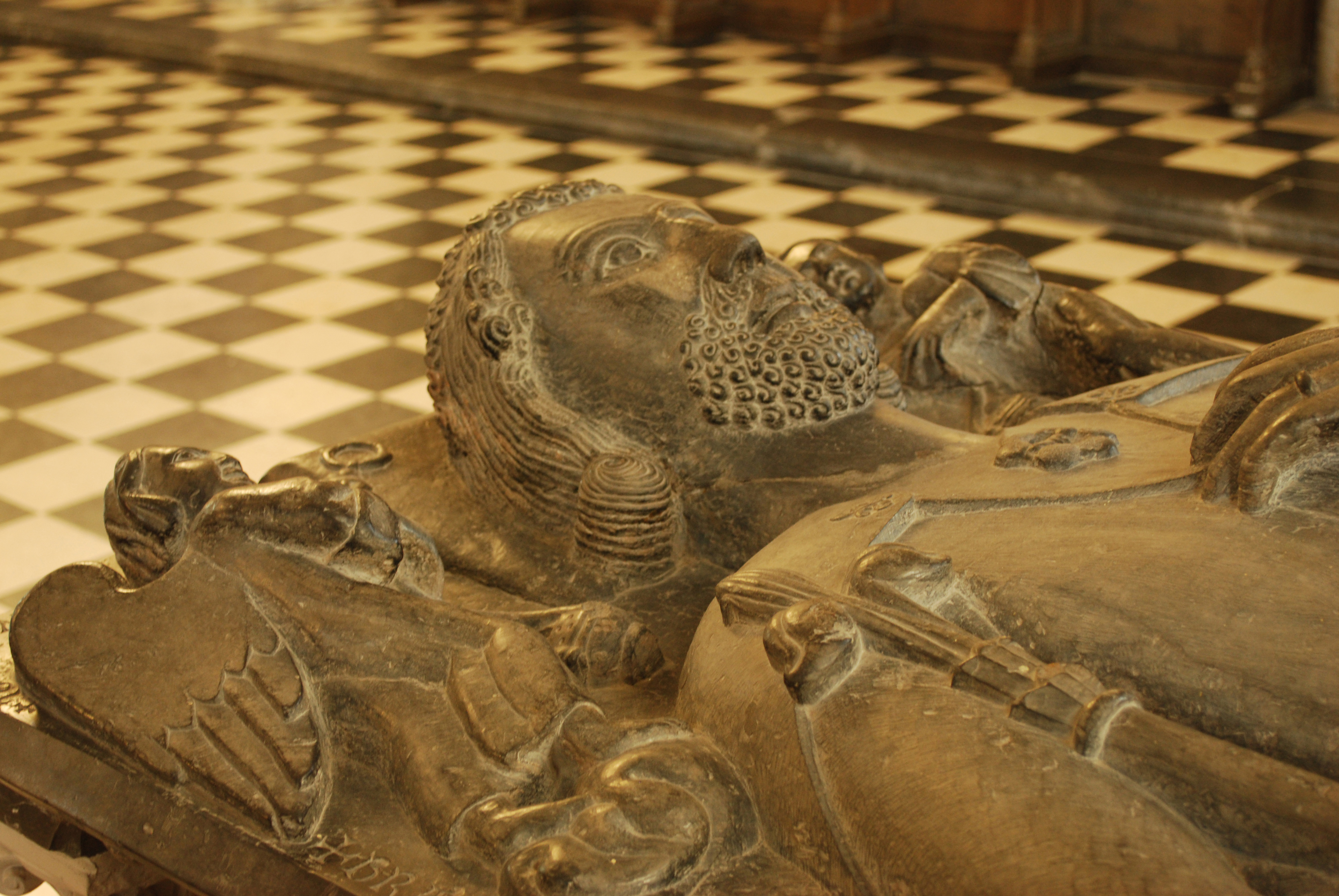 Gisant de Henri Ier de Brabant, église Saint-Pierre à Leuven (Louvain)